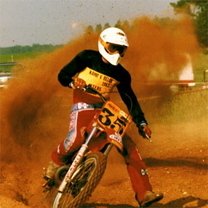 Guy Bleyaert anno 1983 - Categorie Internationalen 500 cc